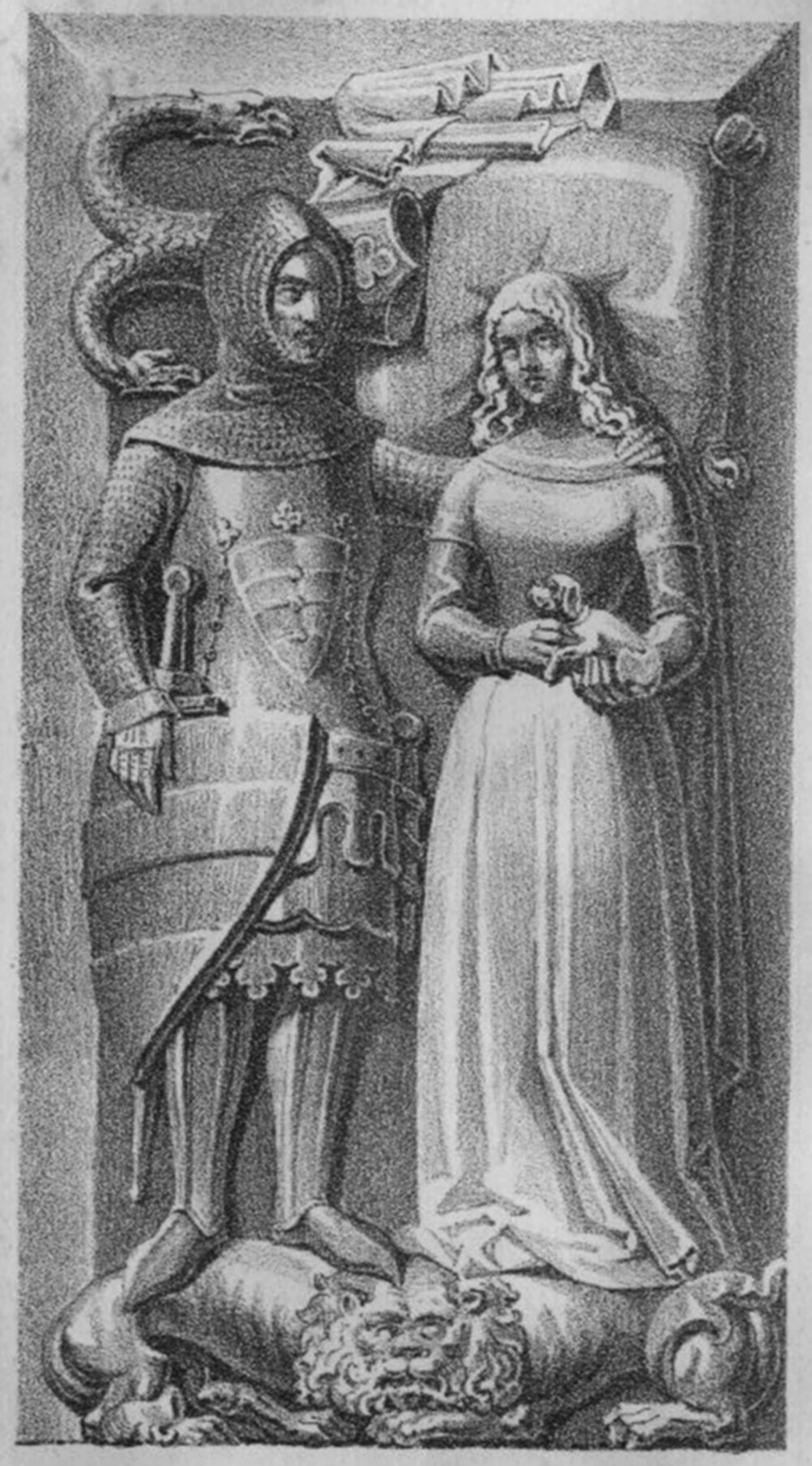 Zeichnung des Grabmals in Scheßlitz, Graf Friedrich III. von Truhendingen und Burggräfin Agnes von Nürnberg